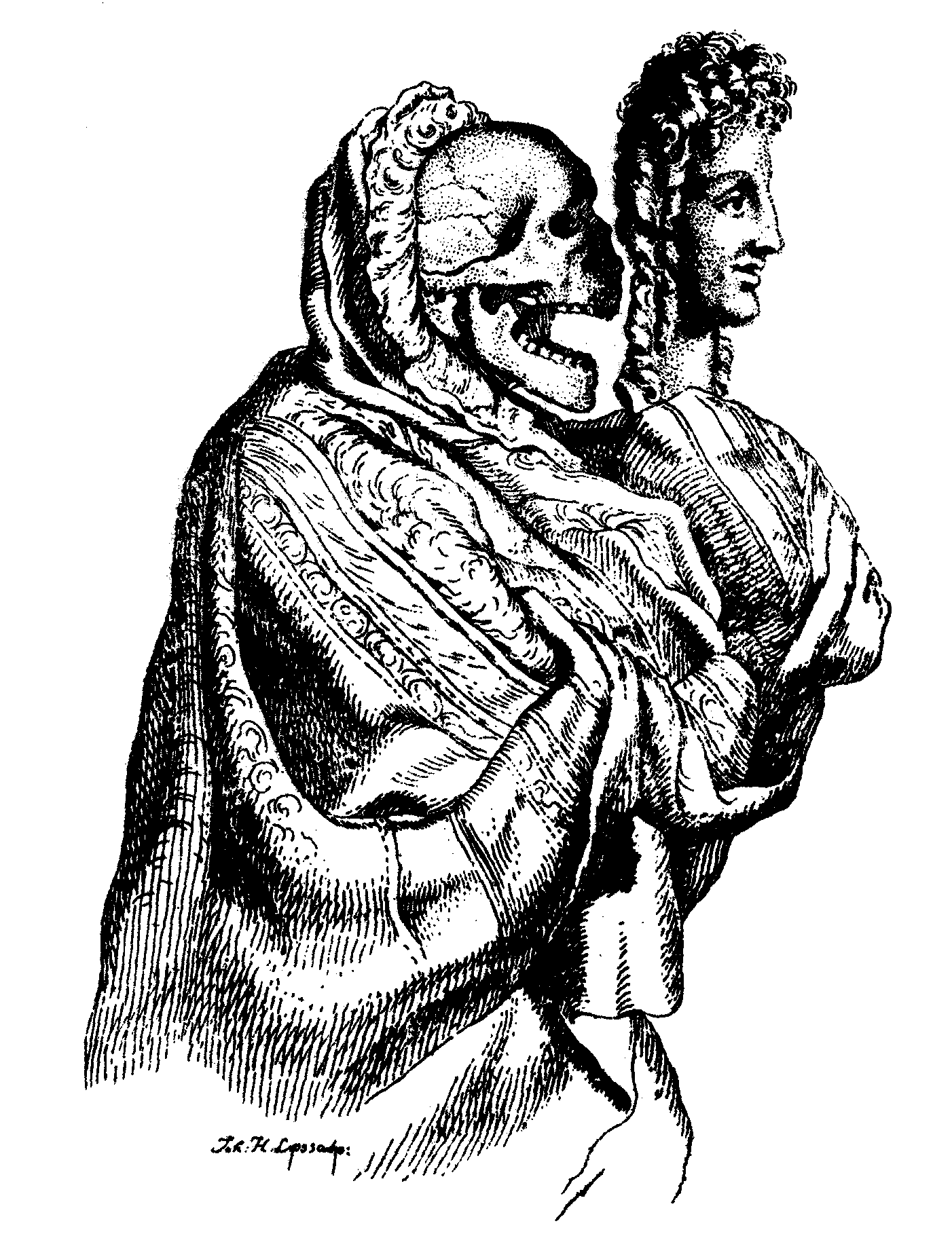 A death's head behind the mask of a pretty girl, signifying the ephemerality of all beauty, engraving in: Johann Caspar Lavater, Physiognomische Fragmente, zur Beförderung der Menschenkenntnisze und Menschenliebe. Leipzig und Winterthur, Weidmanns Erben, 1775-1778, Dritter Versuch, p. 293. After Johann Rudolf Huber's drawing from 1686, Kunstmuseum Bern, Inv. Nr. A 6347, Kehrli 2010, p. 25-27.